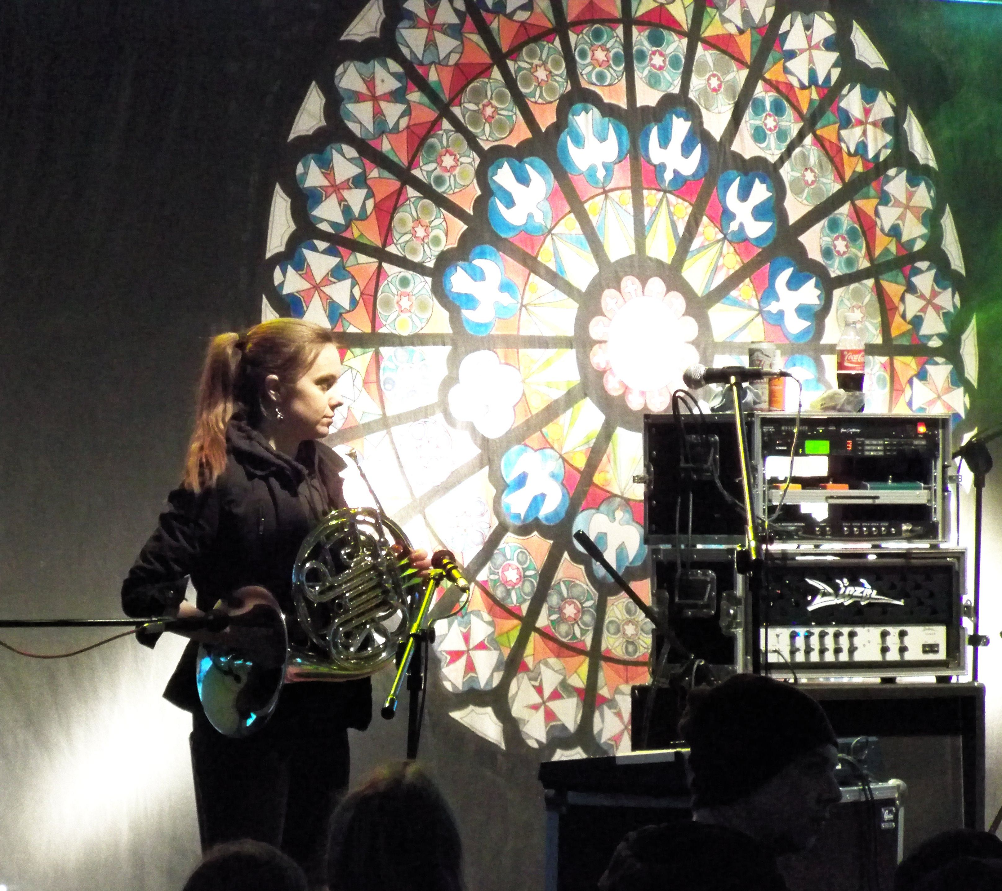 Koncert zespołu Armia w Amfiteatrze w Parku Górczewska w Warszawie z okazji Dnia Wolnego Wyboru, 4 czerwca 2012. Joanna Lis grająca gościnnie na waltorni i klawiszach.